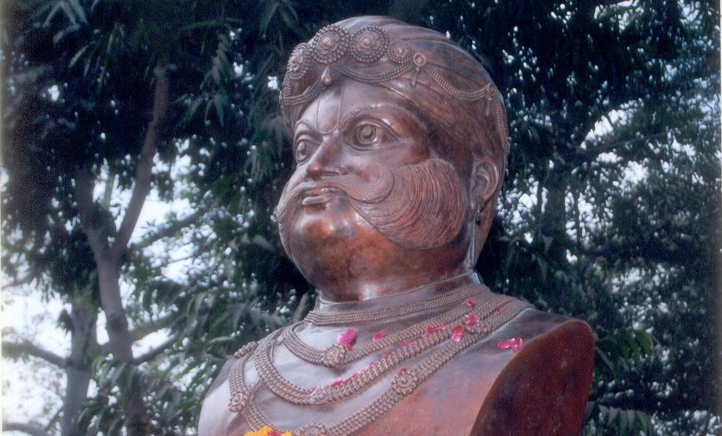 Surajmal Statue